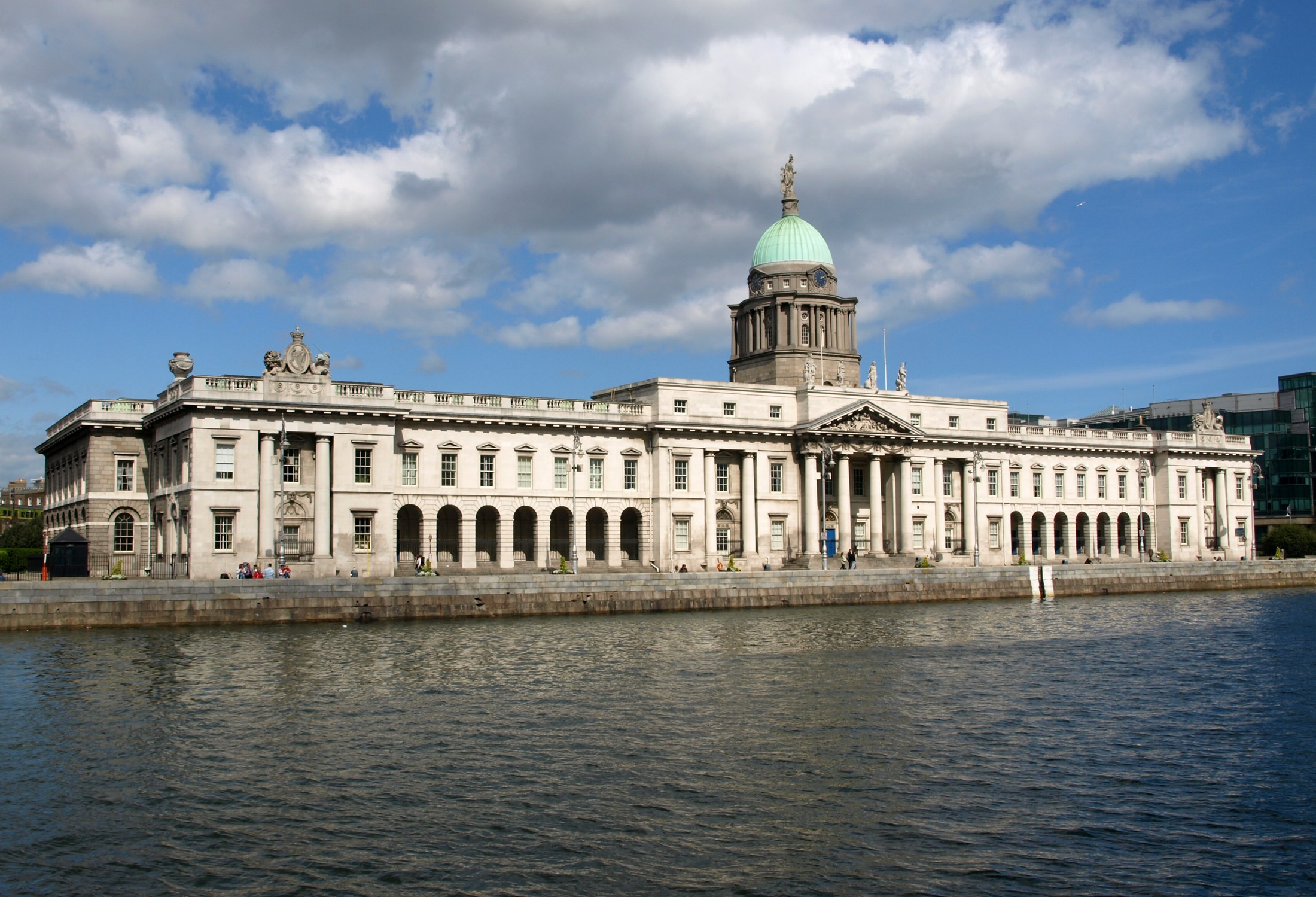 Fachada sur de la Custom House de Dublín a uno de los lados del rio Liffey.